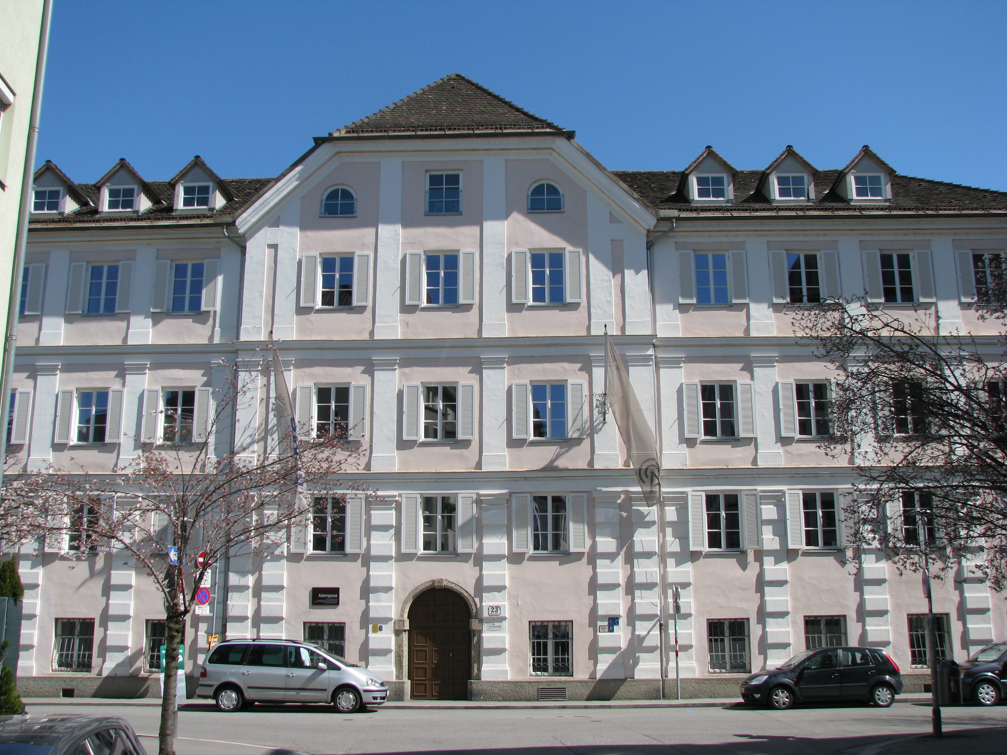 Ansitz Windegg (Palais Stachelburg), Innsbruck-Wilten This media shows the remarkable cultural object in the Austrian state of Tyrol listed by the Tyrolean Art Cadastre with the ID 67089. (on tirisMaps, pdf, more images on Commons, Wikidata)